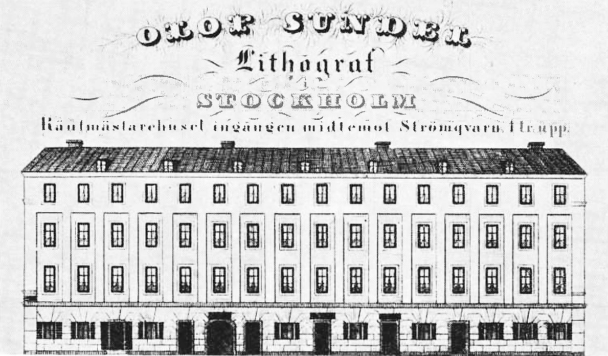 Räntmästarhuset i Gamla stan, reklamtryck av litigrafen Olof Sundel